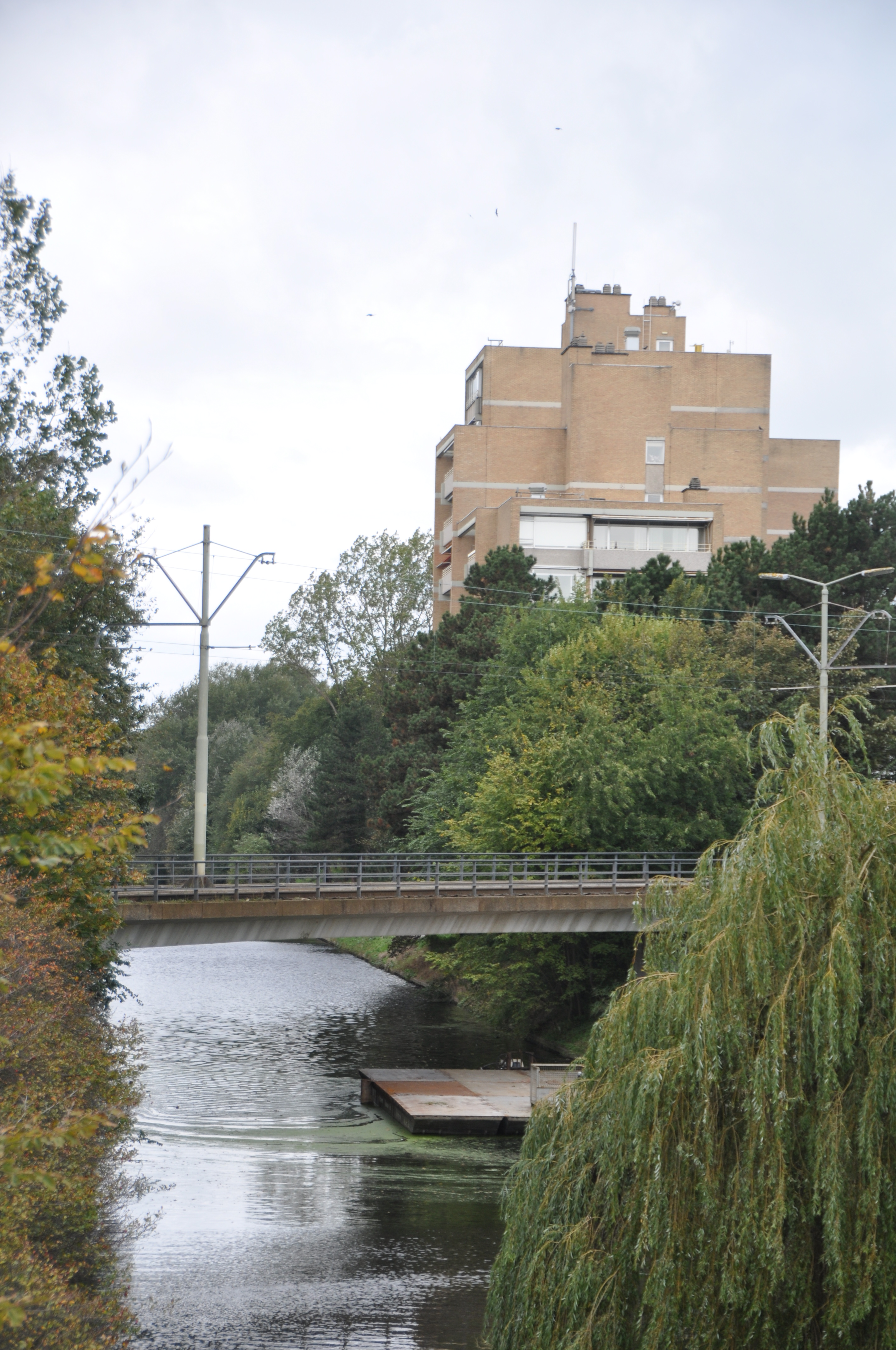 Bruggen in Den Haag.